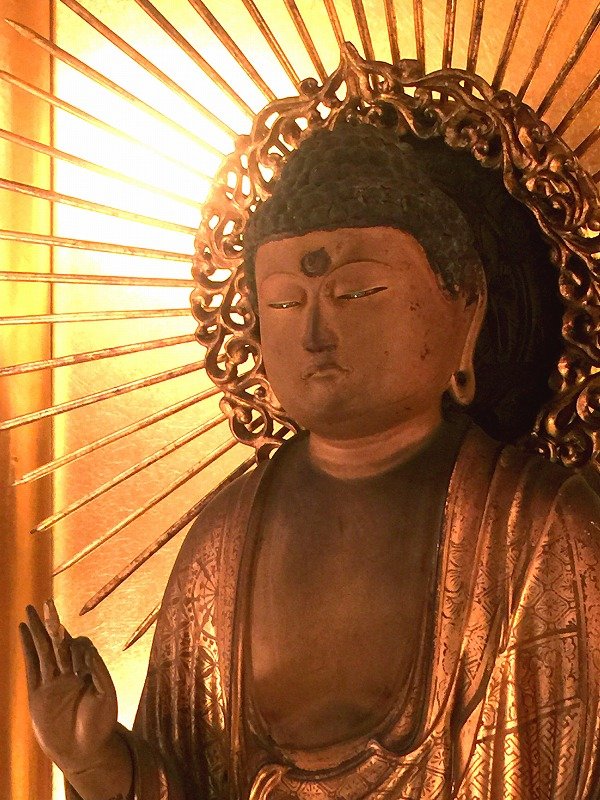 純心寺お内仏 阿弥陀如来像